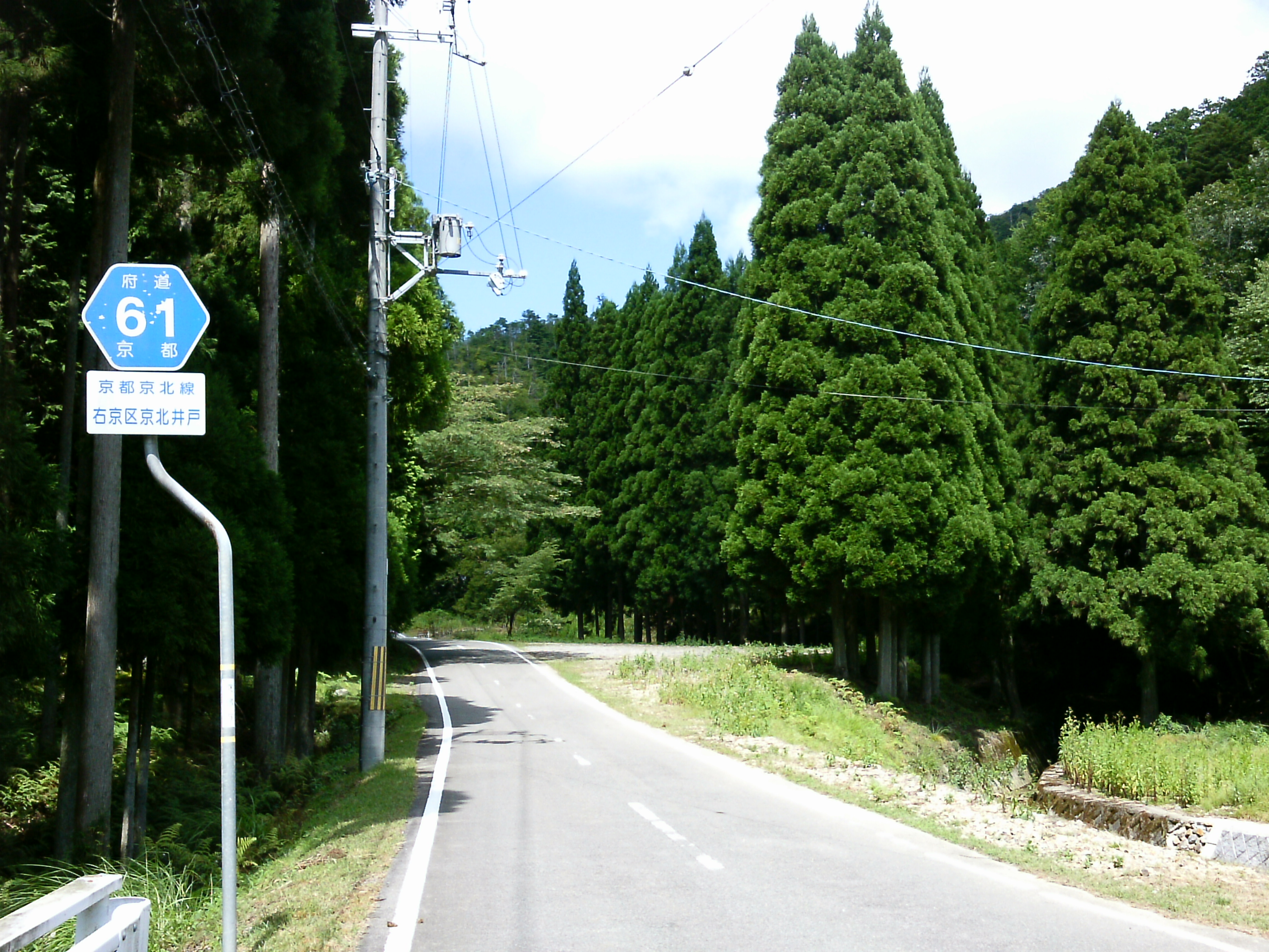 京都府道61号京都京北線、常照皇寺前